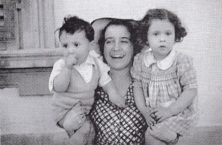 חולדה וילדיה בפירנצה באביב 1943. (מתוך: "לדור אשר לא ידע")